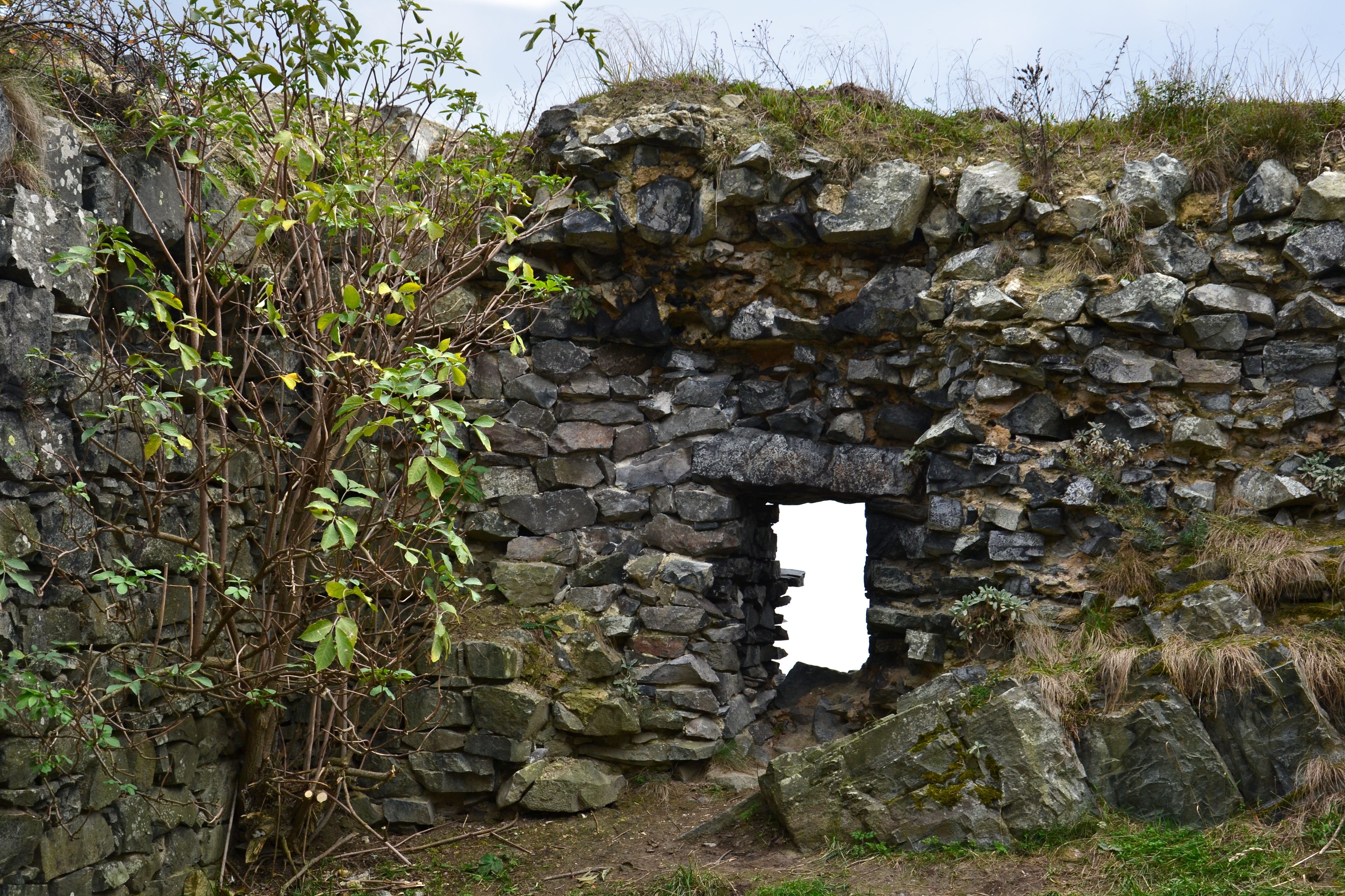 Oltářík – okénko v jižní zdi